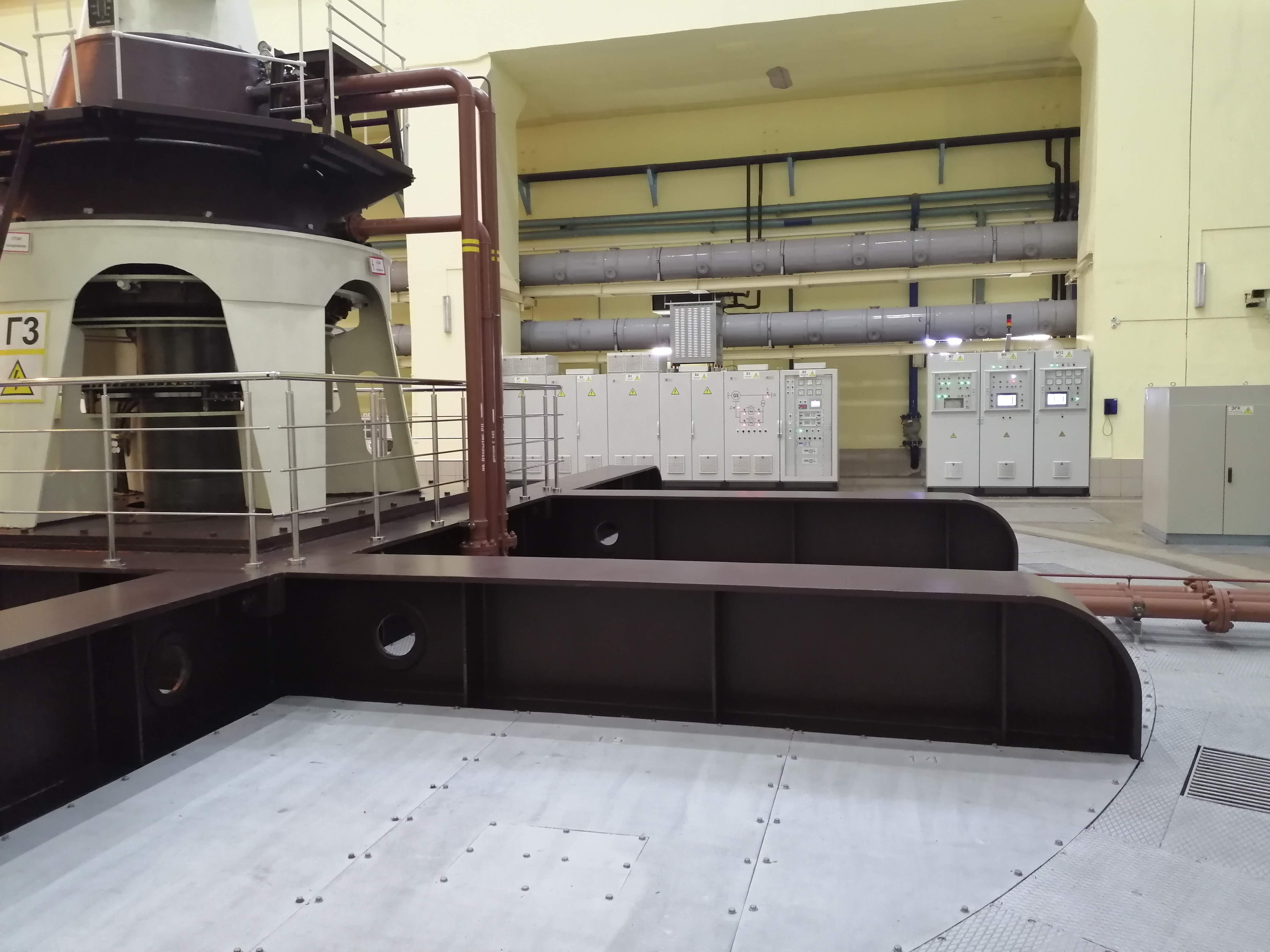 Система управления и регулирования на Новосибирской ГЭС